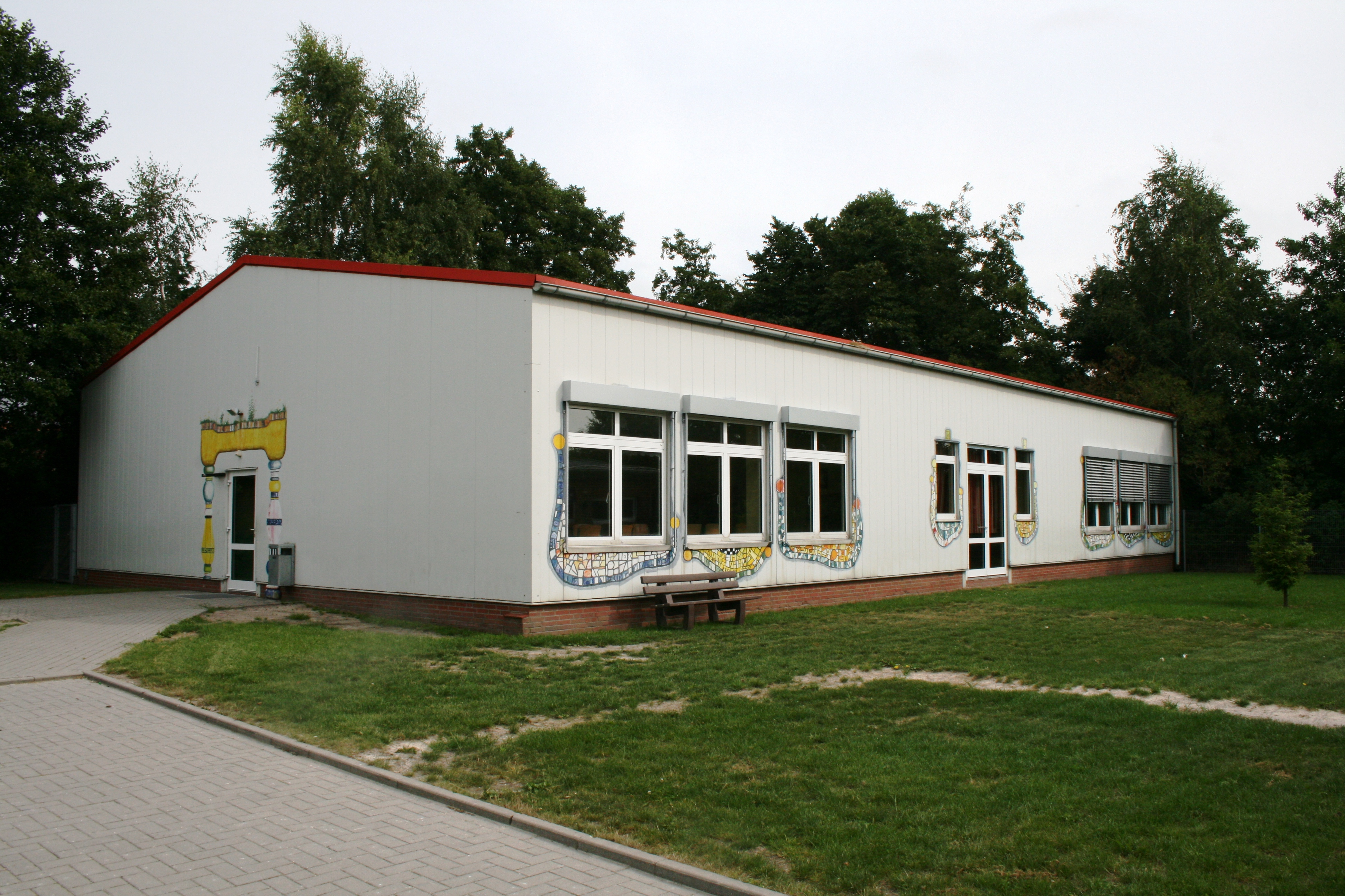 Das sogenannte "Ersatzgebäude" der FCSO. Es wurde im September 1993 errichtet, um fünf weitere Unterrichtsräume unterzubringen.